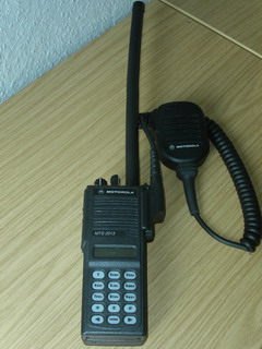 A Motorola radio